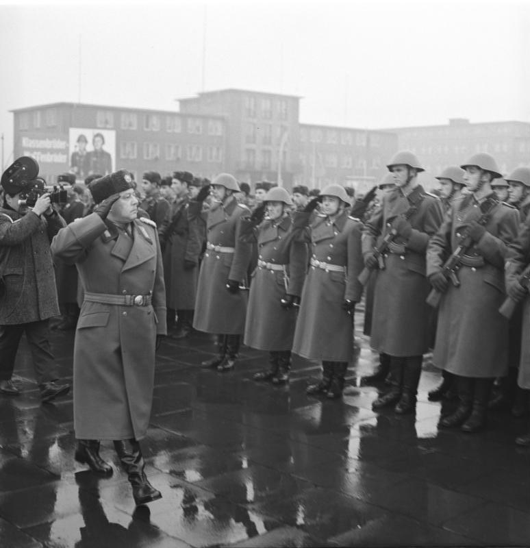 Zentralbild, 15.12.1967 Berlin: Namensverleihung an Wachregiment Der Minister für Staatssicherheit, Generaloberst Erich Mielke, verlieh am 15.12.1967 dem Wachregiment Berlin des Ministeriums für Staatssicherheit den Ehrennamen "Feliks Edmundowitsch Dzierzynski". UBz: Der Minister für Staatssicherheit, Generaloberst Erich Mielke (Links), beim Abschreiten der Front der zum feierlichen Appell anläßlich der Namensverleihung angetretene Einheiten des Wachregiments Berlin.